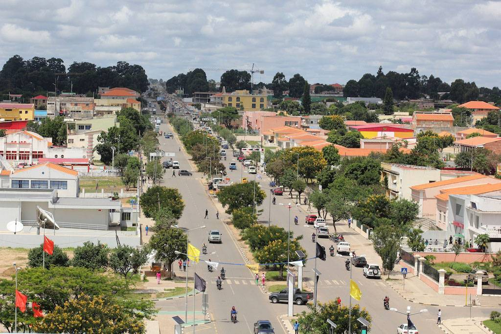 vista parcial da rua principal da cidade do Kuito